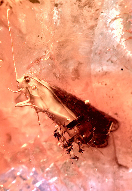 Trichoptère prisonnier d'un morceau d'ambre balte Provenance: Lithuanie Taille de l'echantillon: 4cm X 3,3cm X 1cm Taille de l'inclusion: 0.7mm Espèce: trichoptère Resine: Ambre de la baltique Estimation: 40Millions d'années Issu de ma collection personnelle